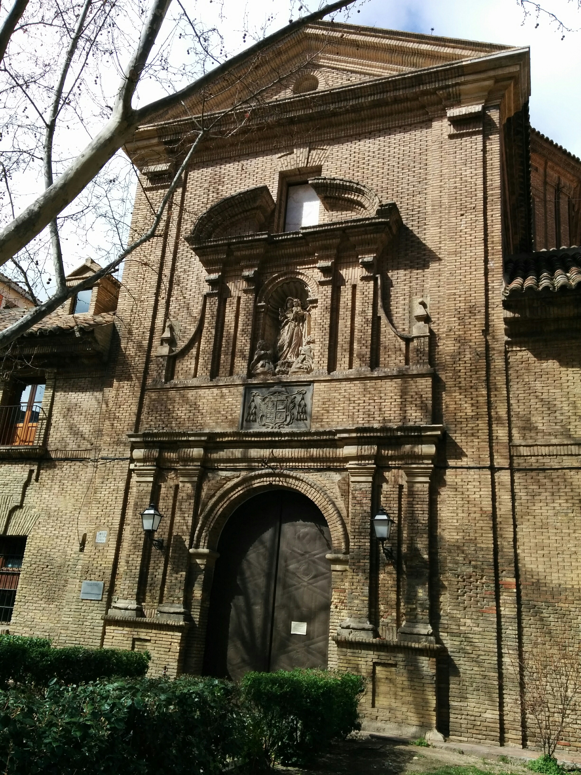 Iglesia del Hospital Provincial de Nuestra Señora de Gracia (Zaragoza).